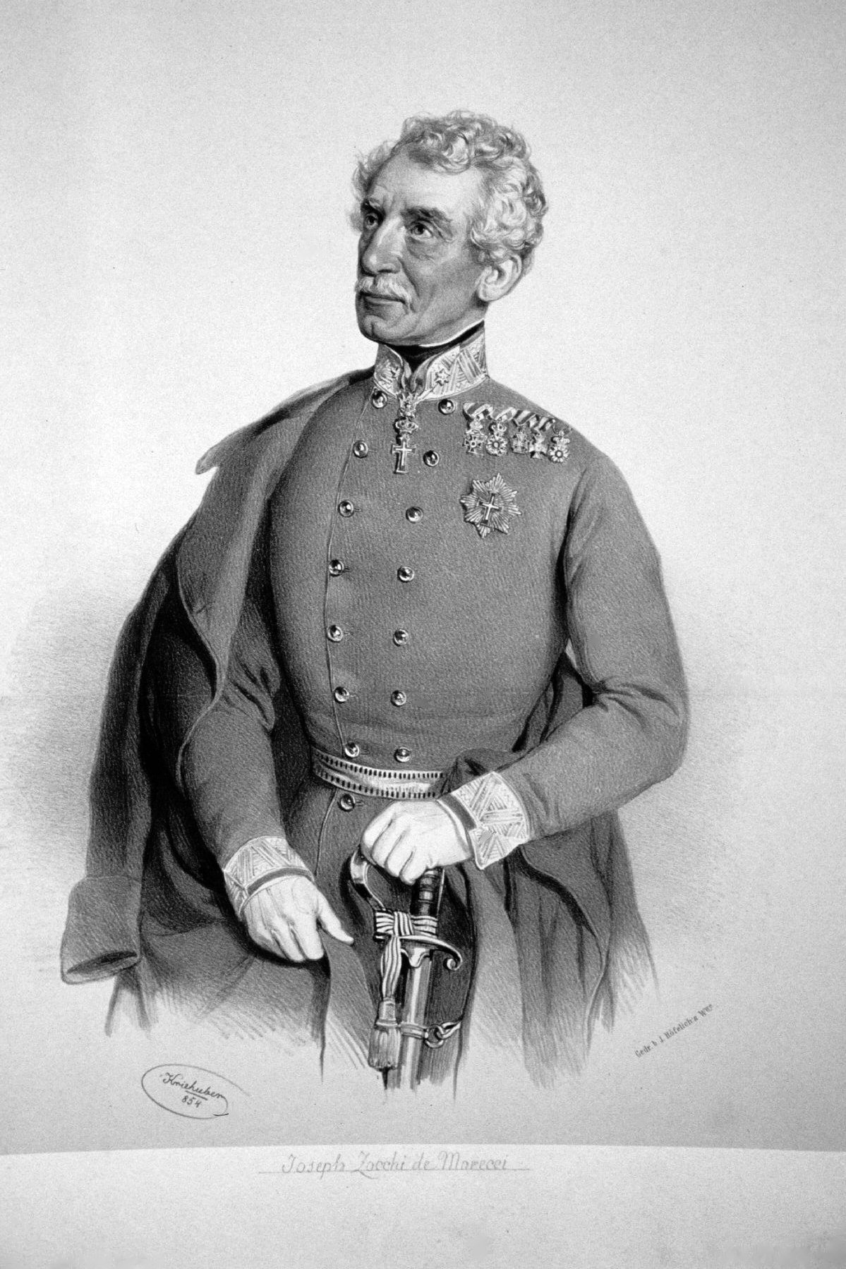 Josef Zocchi, Ritter vom Morecci (1787-1880), österreichischer Pionieroffizier, Generalmajor. Lithographie von Josef Kriehuber, 1854